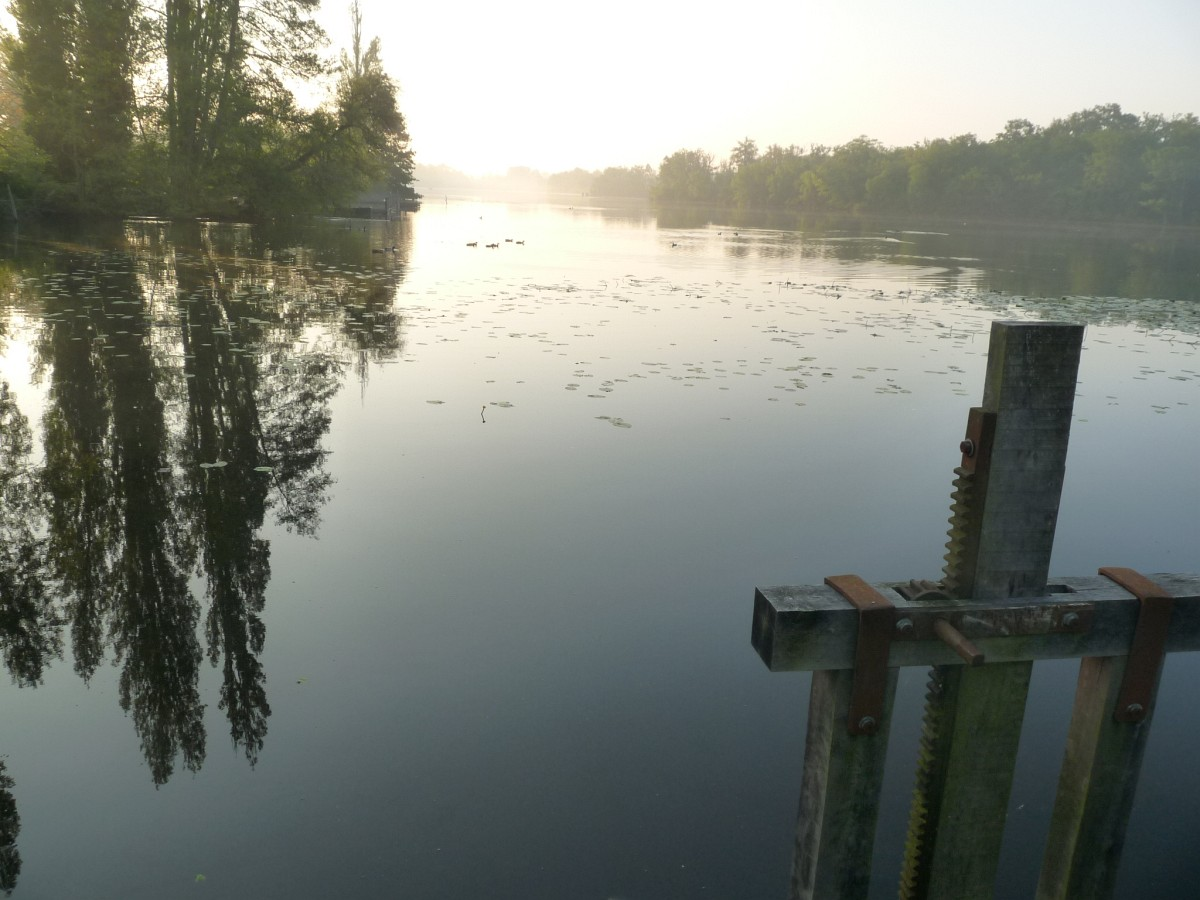 Etang de St-Maigrin au petit matin